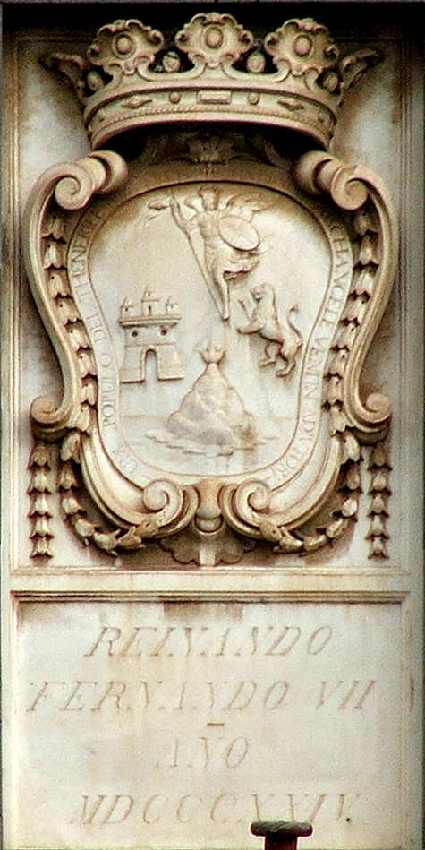 Wappenschild der Stadt La Laguna am Rathaus (Santa Cruz de Tenerife, Spanien)